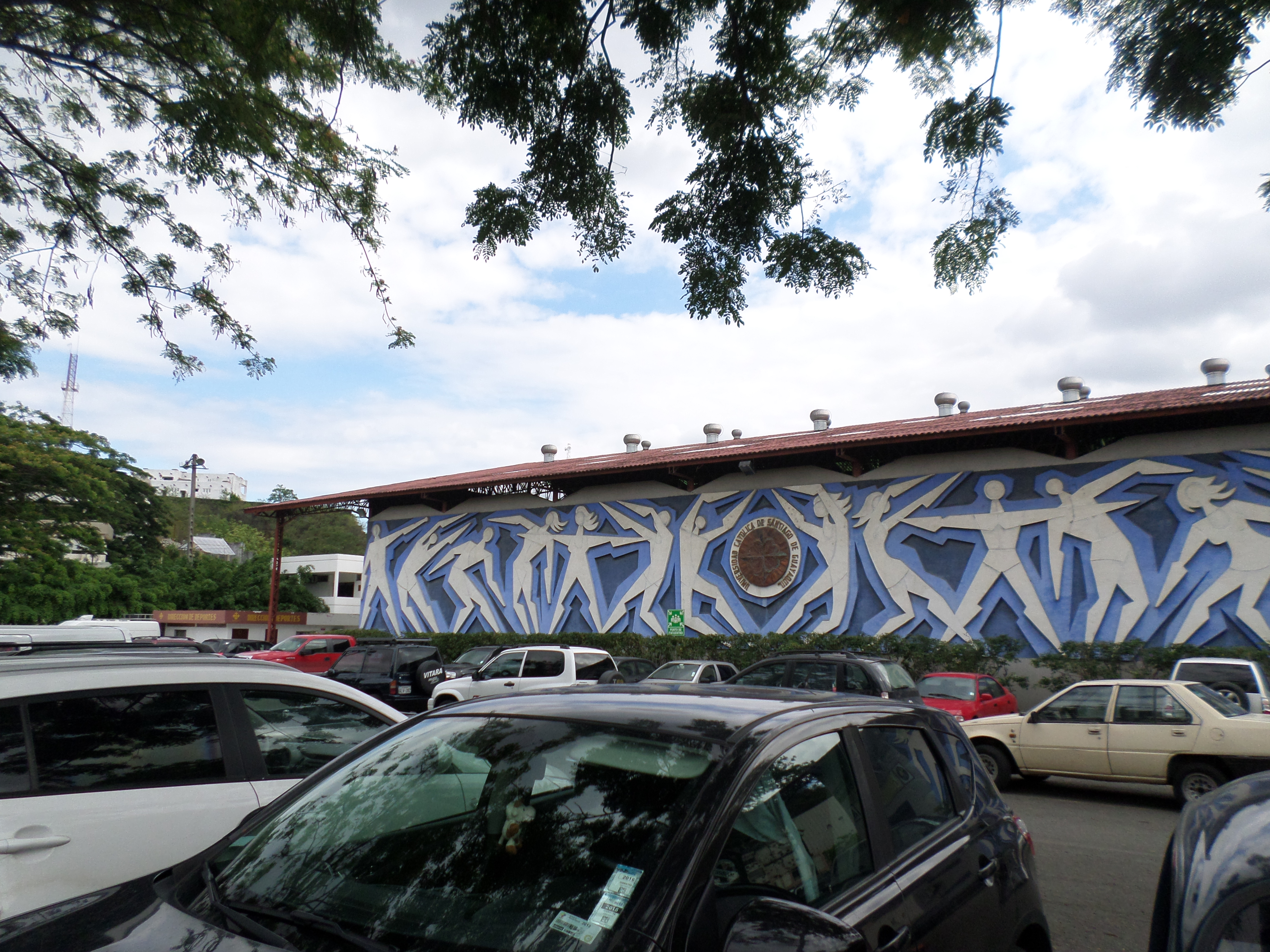 coliseo